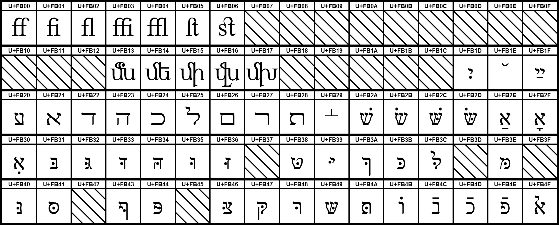 Grafiktafel für den Unicodeblock Alphabetische Präsentationsformen. Schraffierte Felder sind unbesetzte Codepoints.